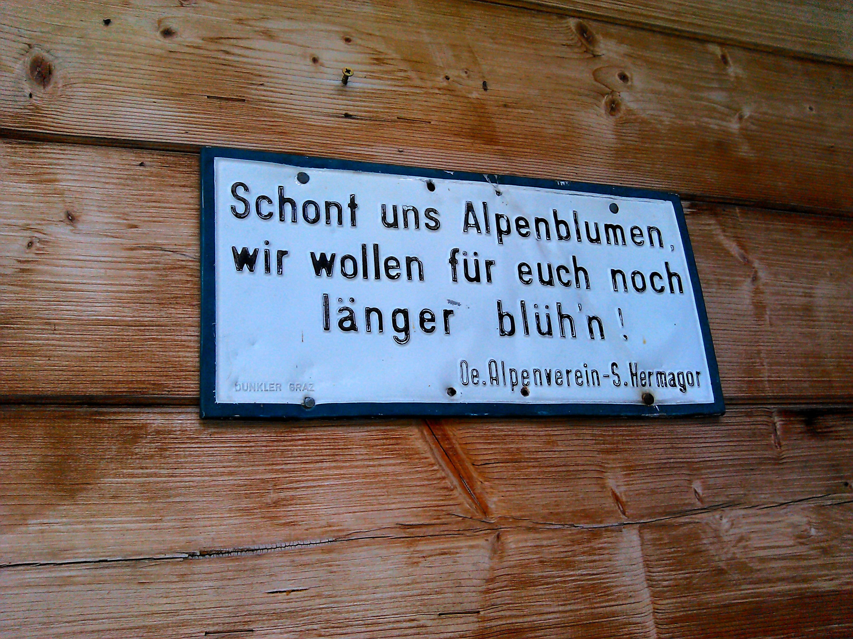 "Schont uns Alpenblumen, wir wollen für euch noch länger blüh'n", Schild des Österreichischen Alpenvereins.